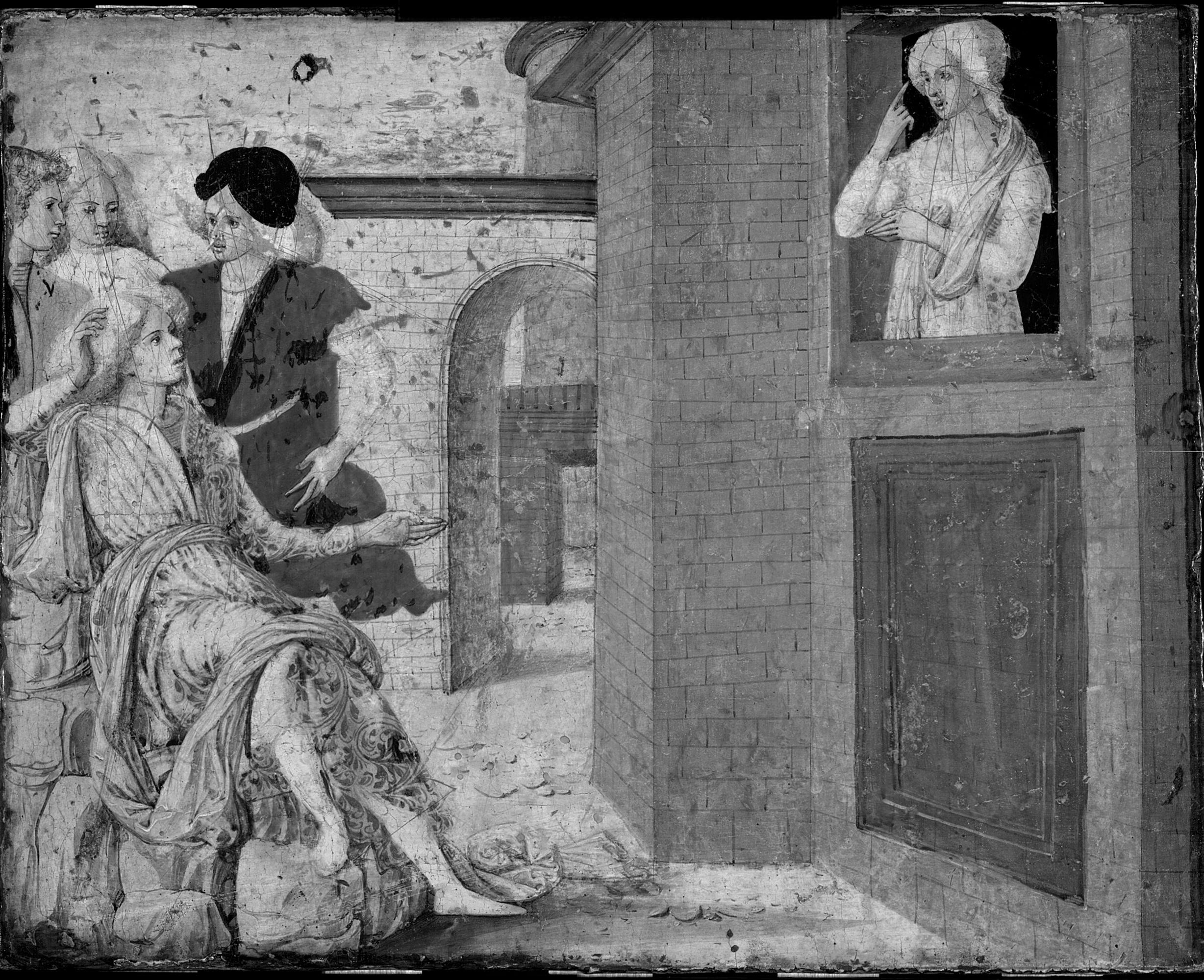 Painting, cassone panel; Paintings